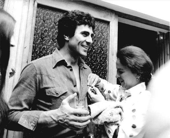 Neubrandenburg, Gojko Mitic, Natalia Rytschagina ADN-ZB Bartocha 1.7.78 Neubrandenburg-Sommerfilmtage Ein besonderes Ereignis zu den 17. Sommerfilmtagen war die Anwesenheit von Hauptdarstellern bekannter Filme. Gojke Mitic erhielt als Zeichen der Freundschaft ein Abzeichen von der sowjetischen Schauspielerin Natalia Rytschagina. Abgebildete Personen: Mitic, Gojko: Schauspieler, Jugoslawien (GND 118582798)